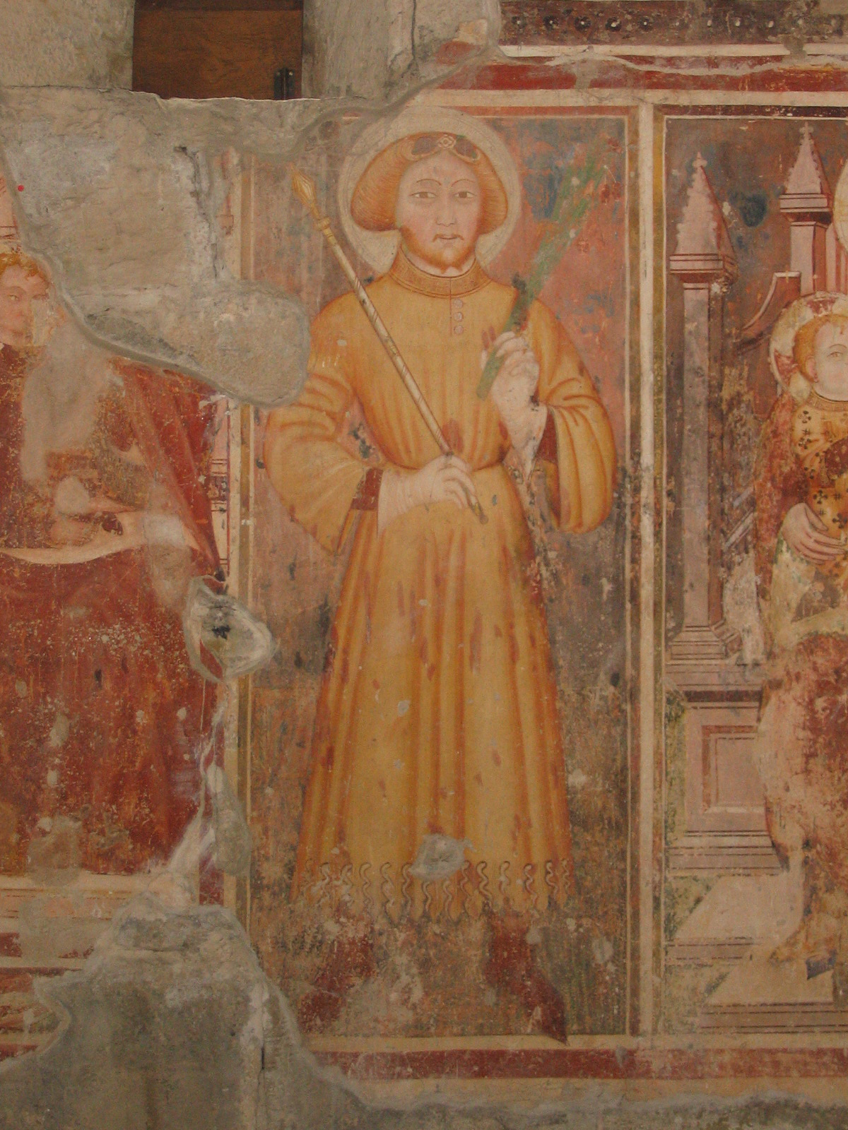 San Giorgio e la principessa; affresco, bottega del cosiddetto "Maestro del 1388" e datato alla fine degli anni '80 del XIV secolo. Chiesa di San Giorgio in Lemine (ad Almenno San Salvatore, Bergamo). Fotografia di Giorces.